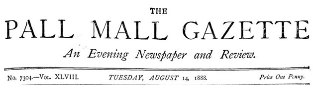 Logo Pall Mall Gazette 1888